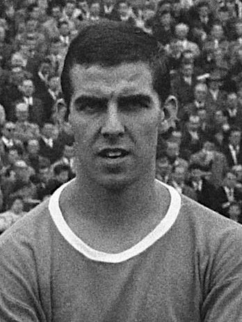 Freek van der Lee